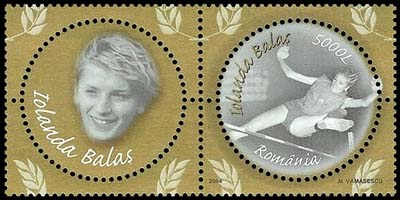 Romania 2004 stamp Iolanda Balaș